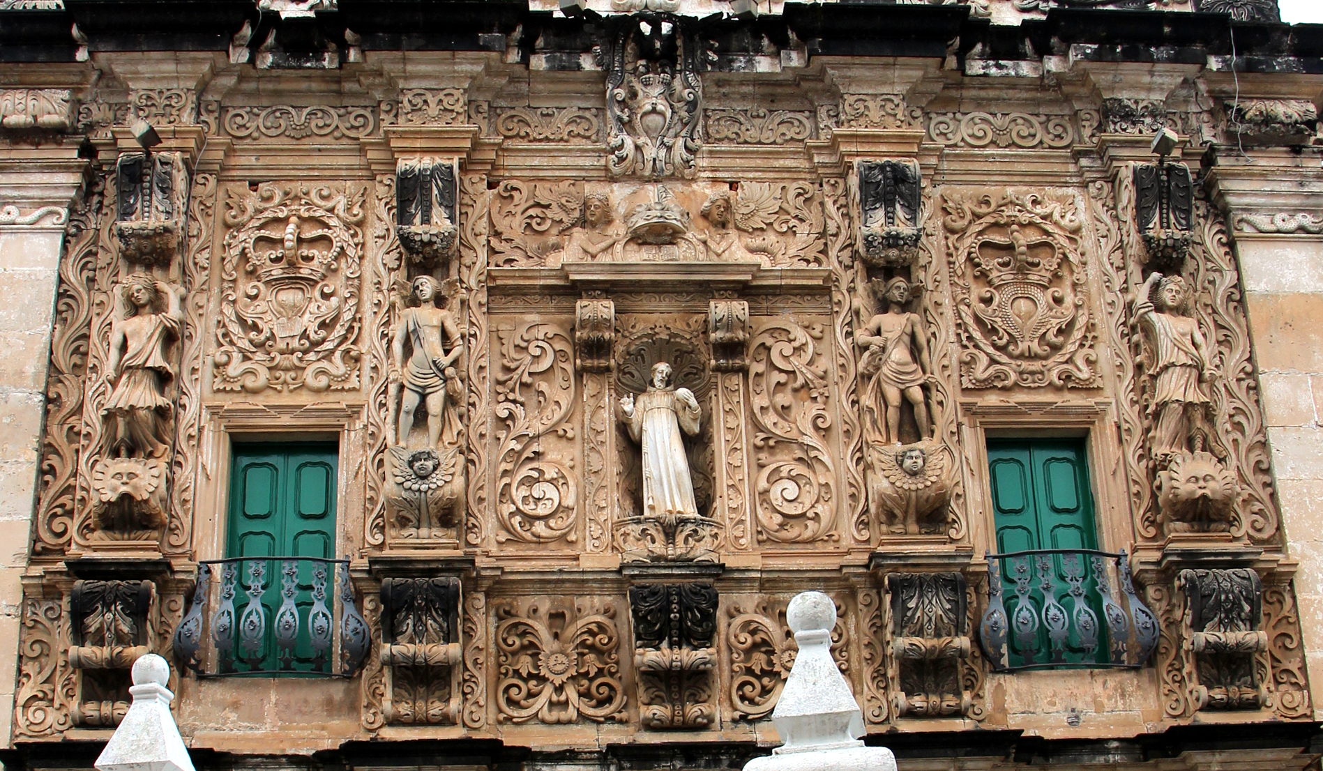 Detalhe da fachada da Igreja dos Terceiros de S. Francisco em Salvador.